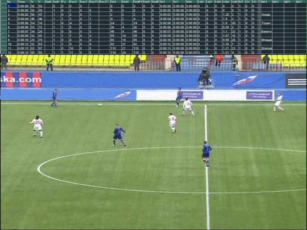 Фрагмент работы сканера футбольно матча компании CraftSoft.